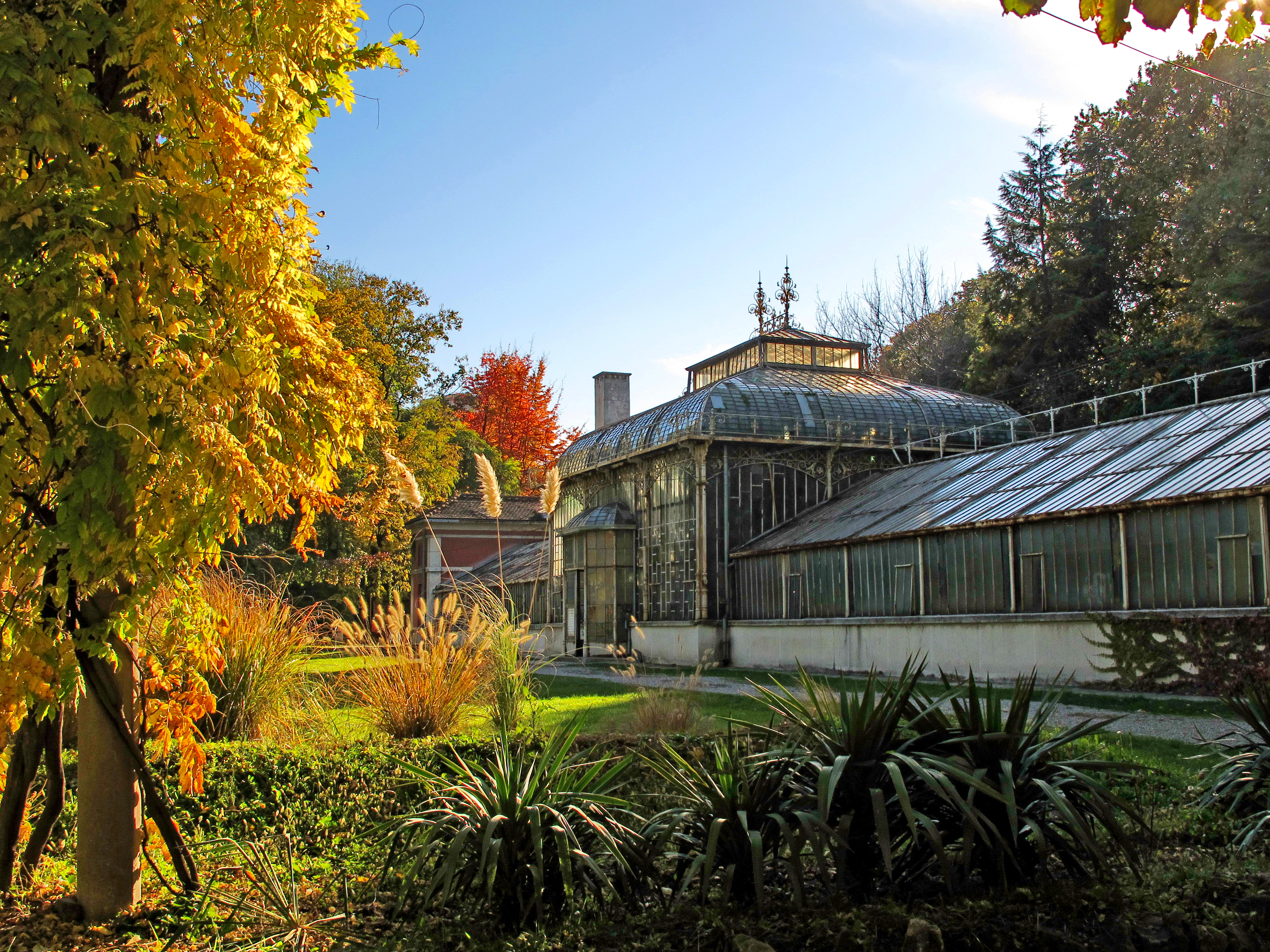 Ово је фотографија заштићеног природног добра у Србији под шифром: СП005 This is a a photo of a natural area in Serbia with ID: СП005 Споменик природе Ботаничка башта Јевремовац